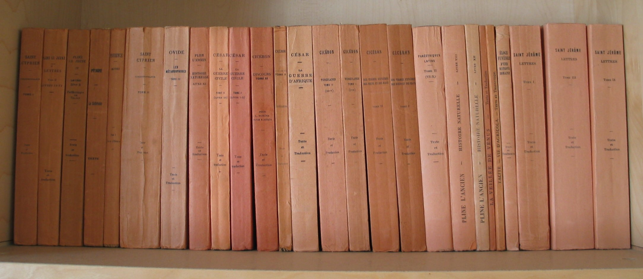 Une collection de livres latins édités par 'Les Belles Lettres'